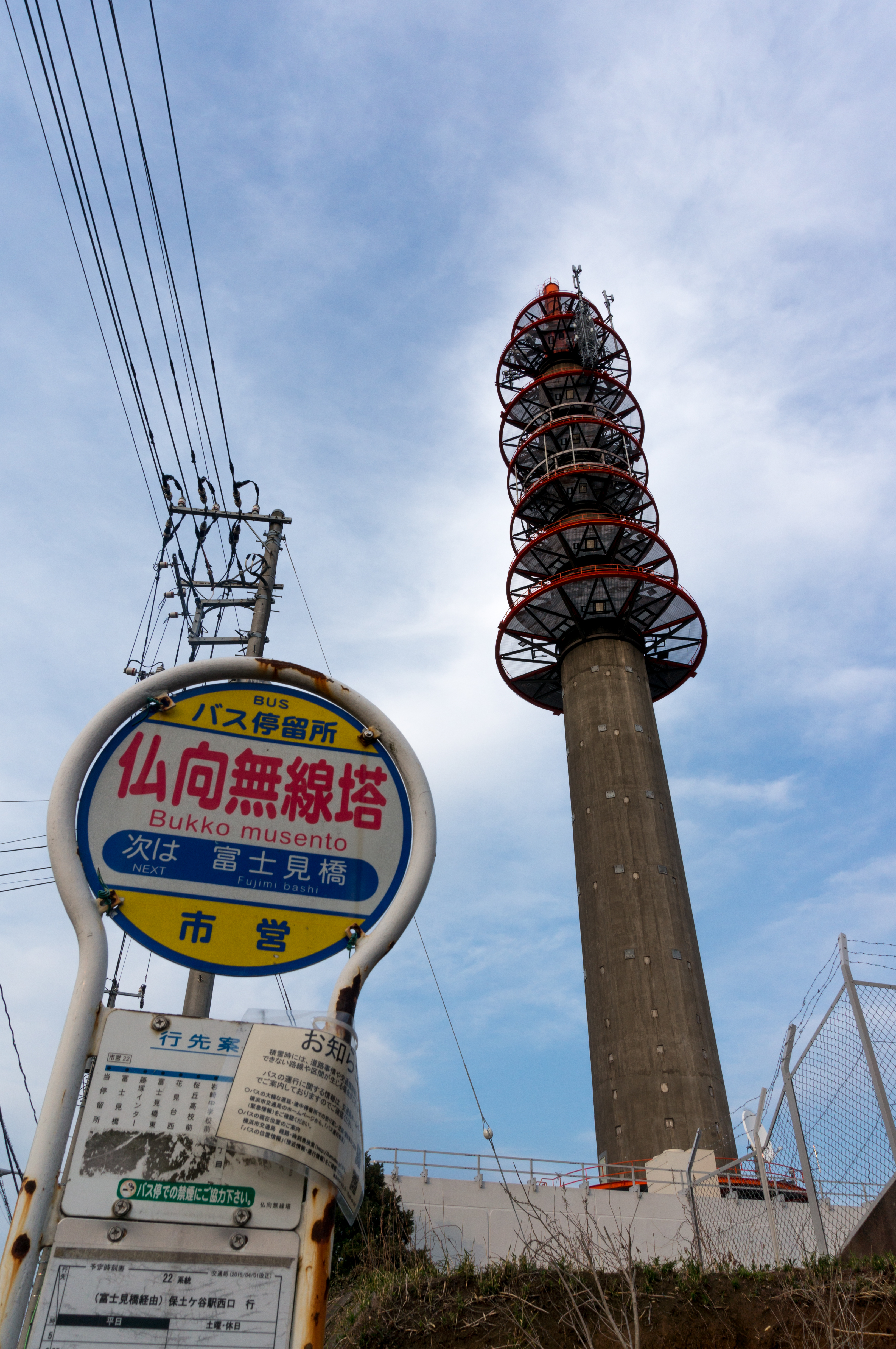 無線塔の上から2段目にJモバのマルチメディア放送用送信アンテナ(双ループ2段)が見えている